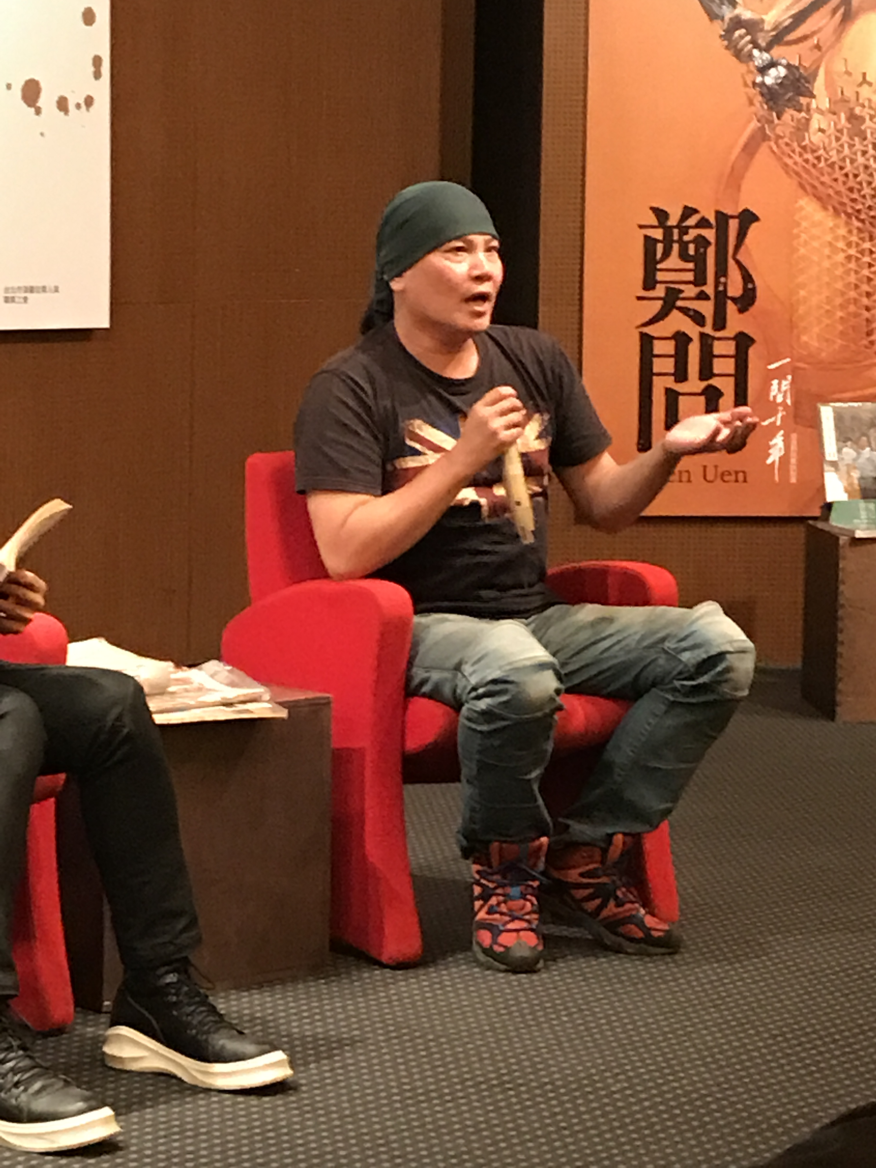 練任於鄭問追思座談會中談與鄭問師徒相處的體驗。